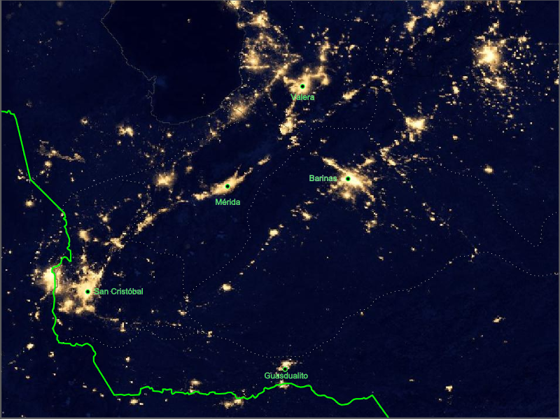 Vista nocturna satelital de las principales aglomeraciones urbanas de la Región de Los Andes. Fecha de captura de la imagen: Diciembre 2012